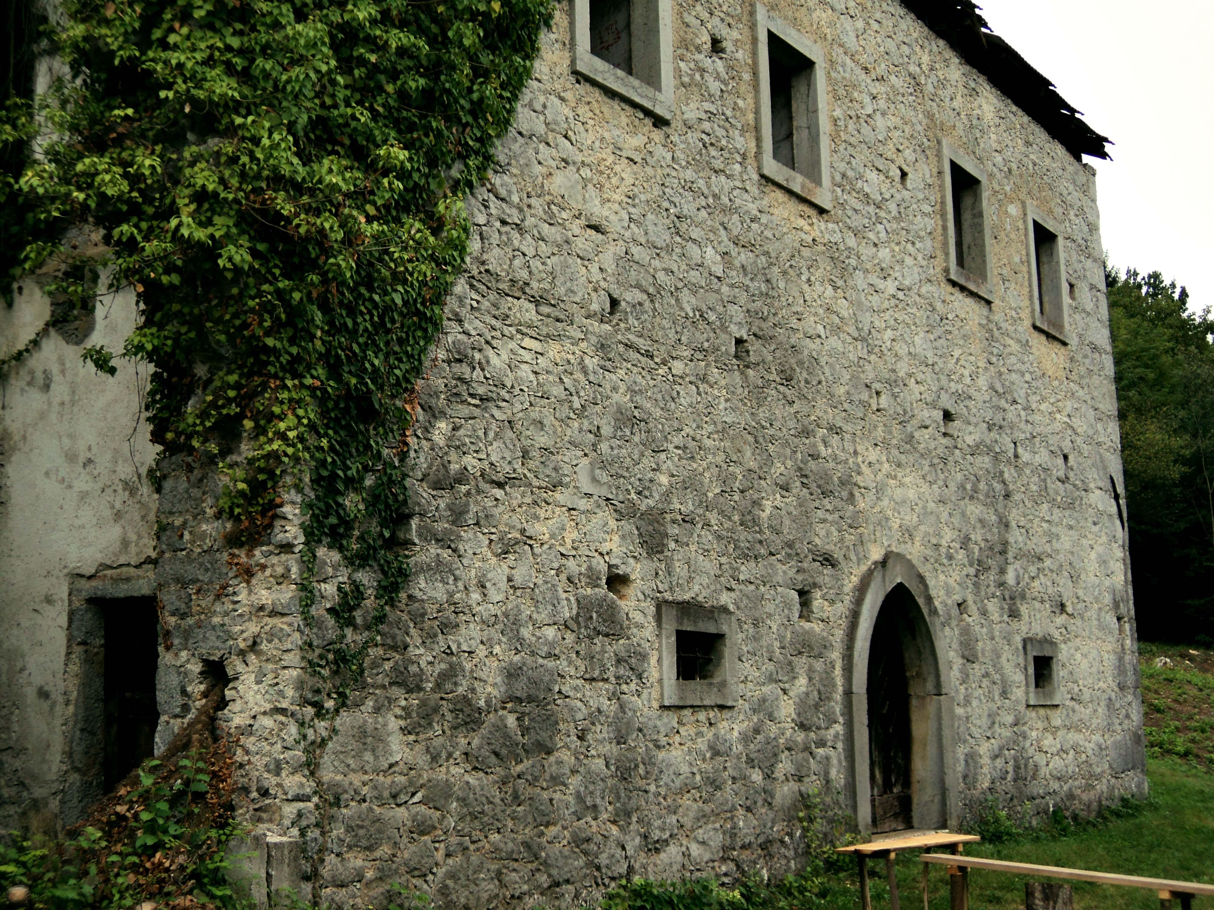 Turn pri Črnomlju 2010